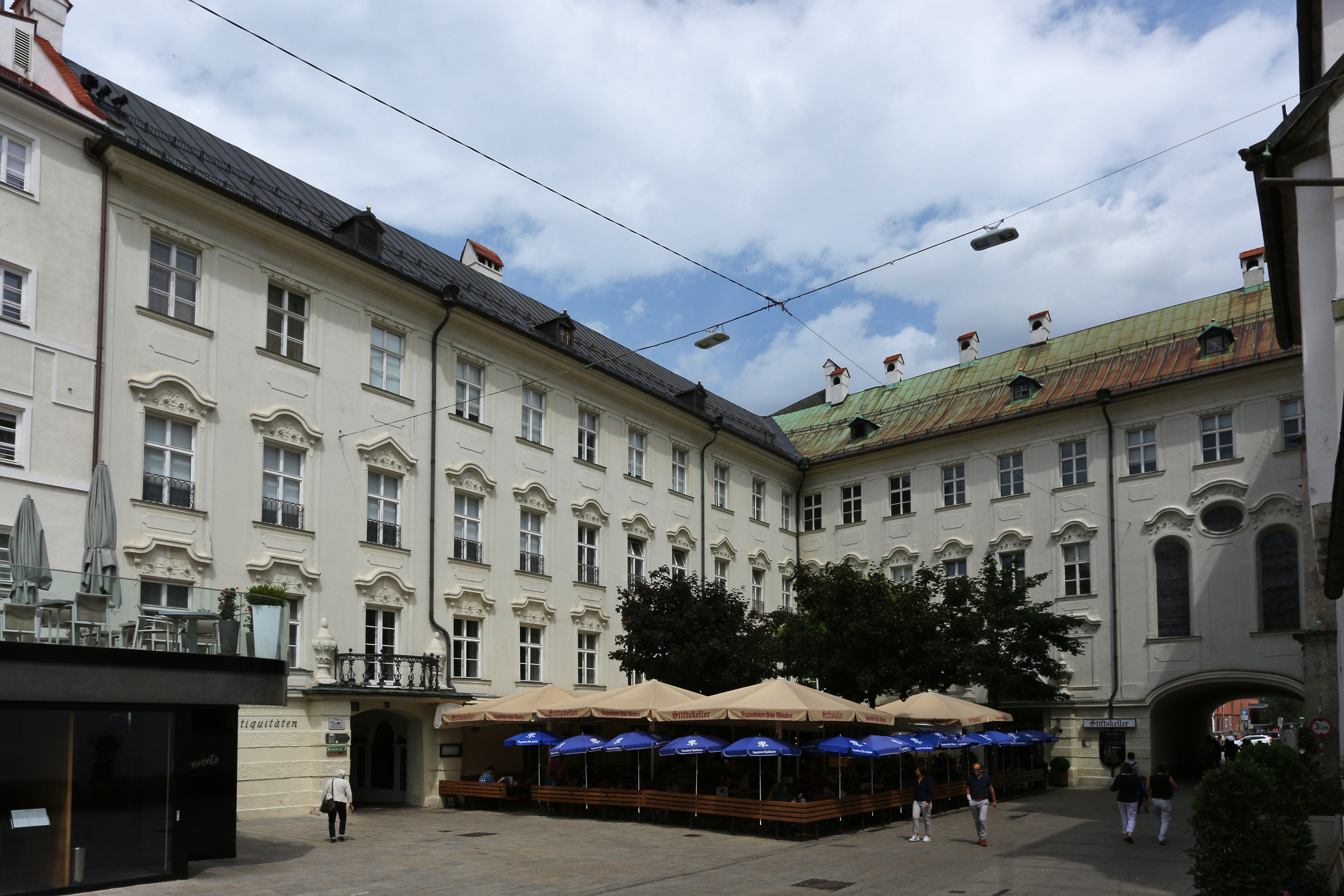 Burggraben 31